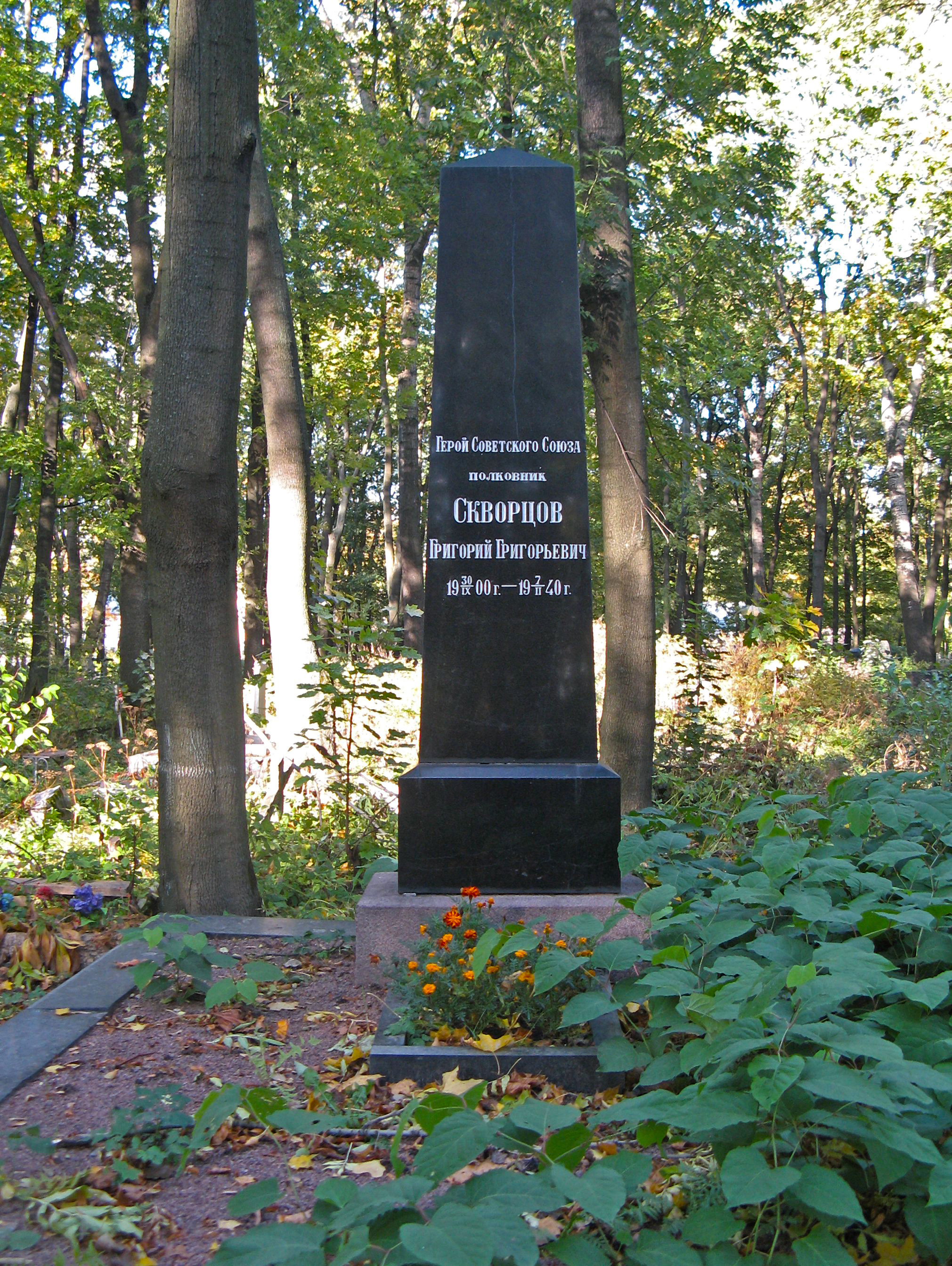 Могила Г.Г. Скворцова (1900-1940), Героя Советского Союза: набережная р. Волковки, 3, Волковское лютеранское кладбище, Шмидтовская дорожка, Фрунзенский район, Санкт-Петербург